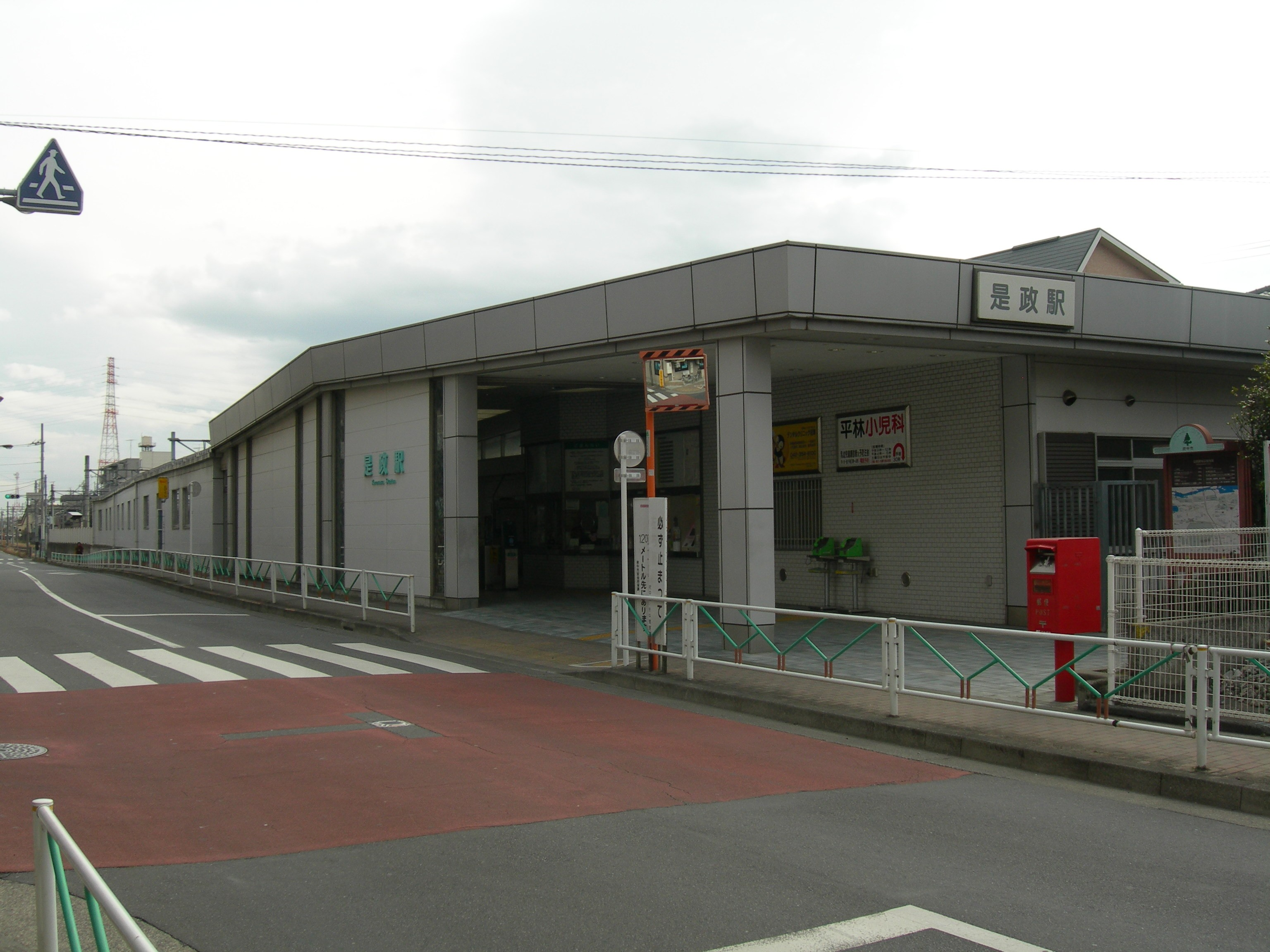 西武多摩川線是政駅駅舎